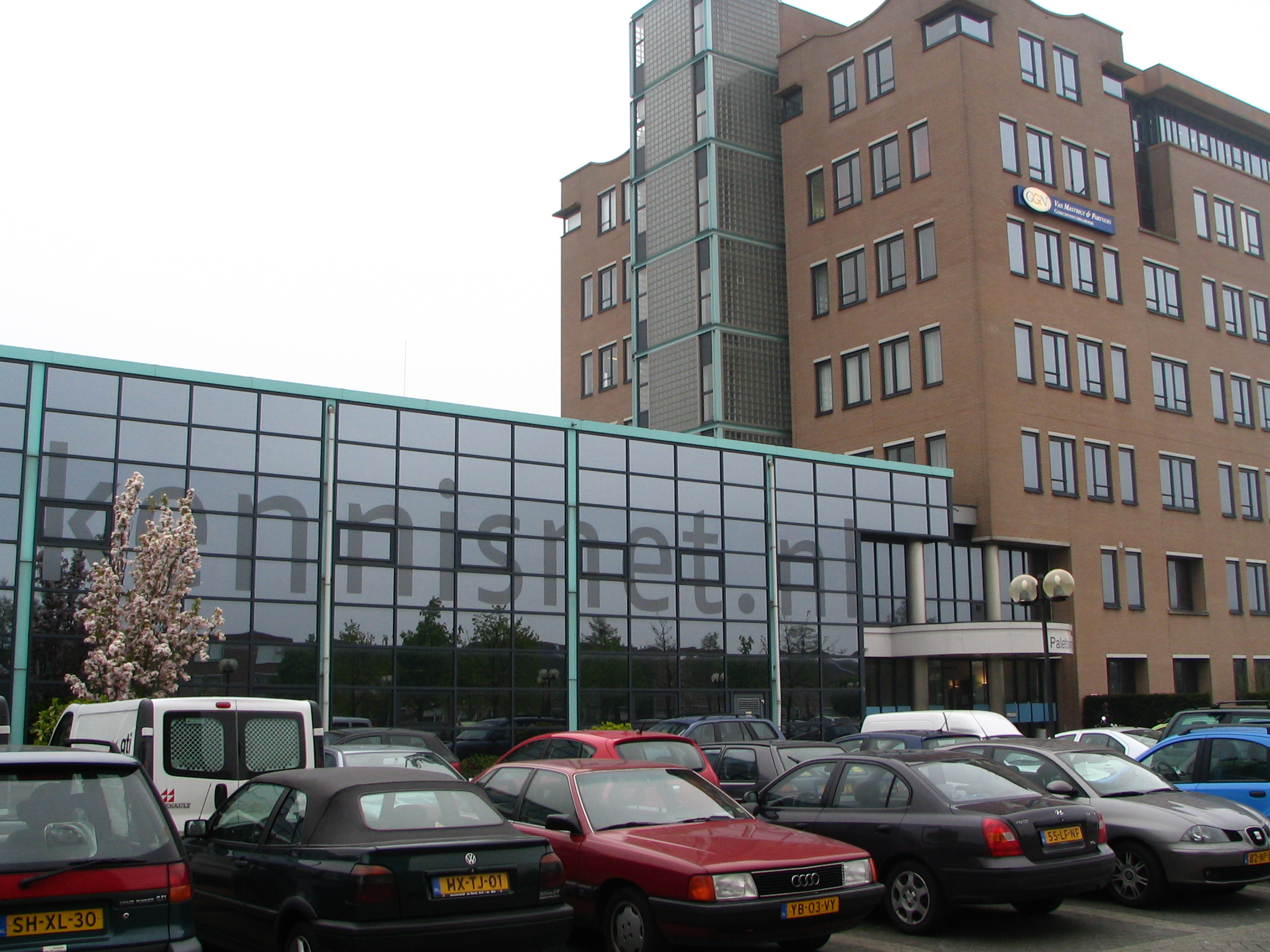 Het kantoor van Kennisnet